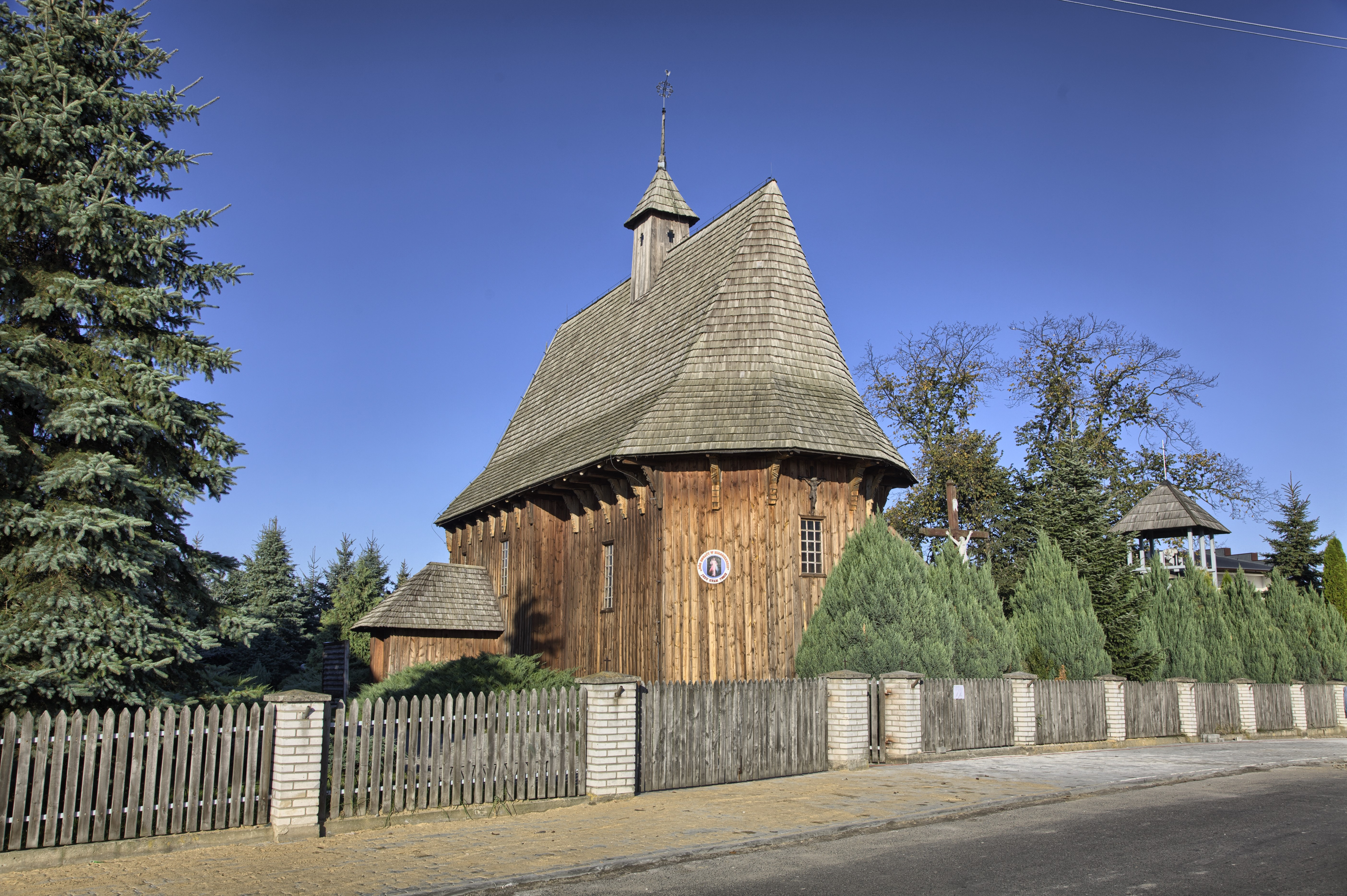 Łaszew - kościół filialny pw, św. Jana Chrzciciela, XVI w.